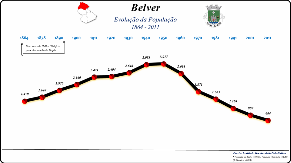 Evolução da População